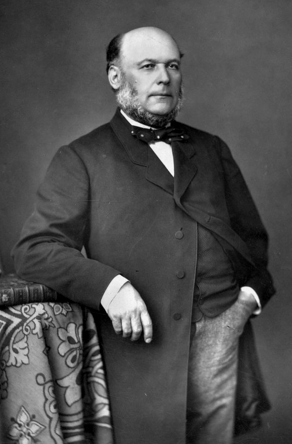 Portrait photographique de Jules Grévy.